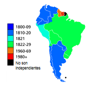 Fechas de Independencias de los países de américa del sur